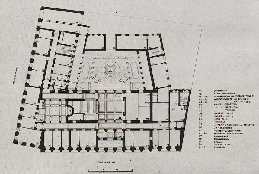 Grundriss der Deutschen Botschaft in Sankt Petersburg, Peter Behrens, 1912